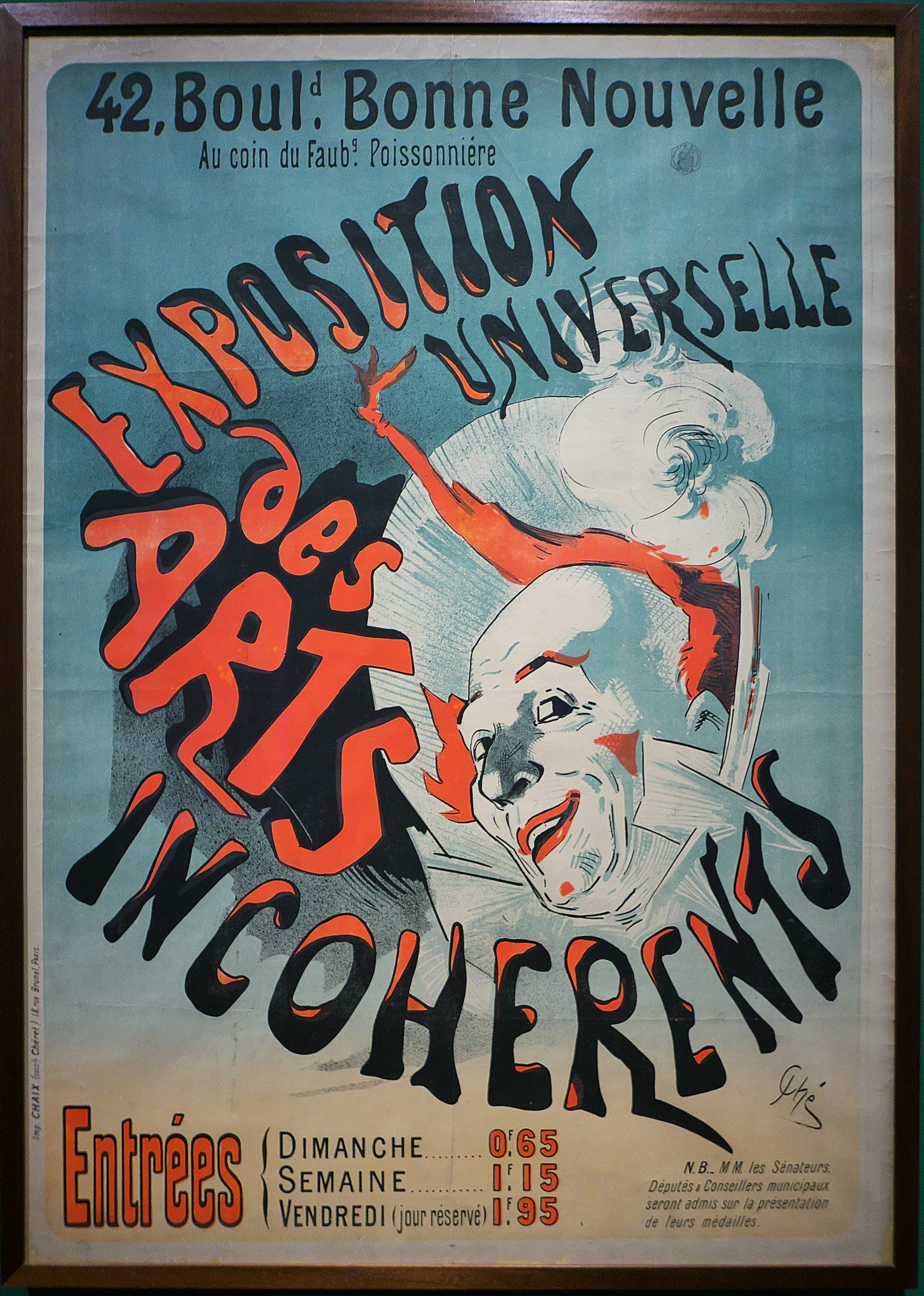 Cartel litográfico de Jules Chéret (1899).